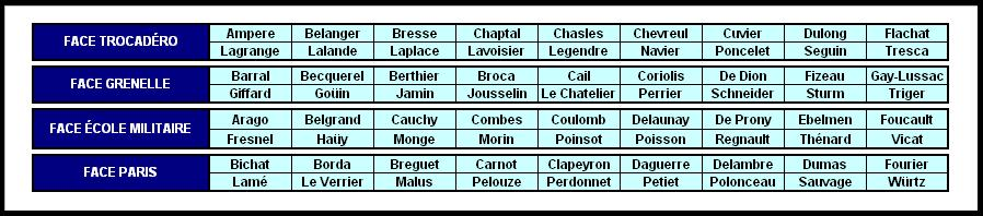 *Liste des 72 noms de savants inscrits sur le perimètre du premier étage de la tour Eiffel. Fichier Excel importé sous paint réalisé par moi-même (Kuxu).